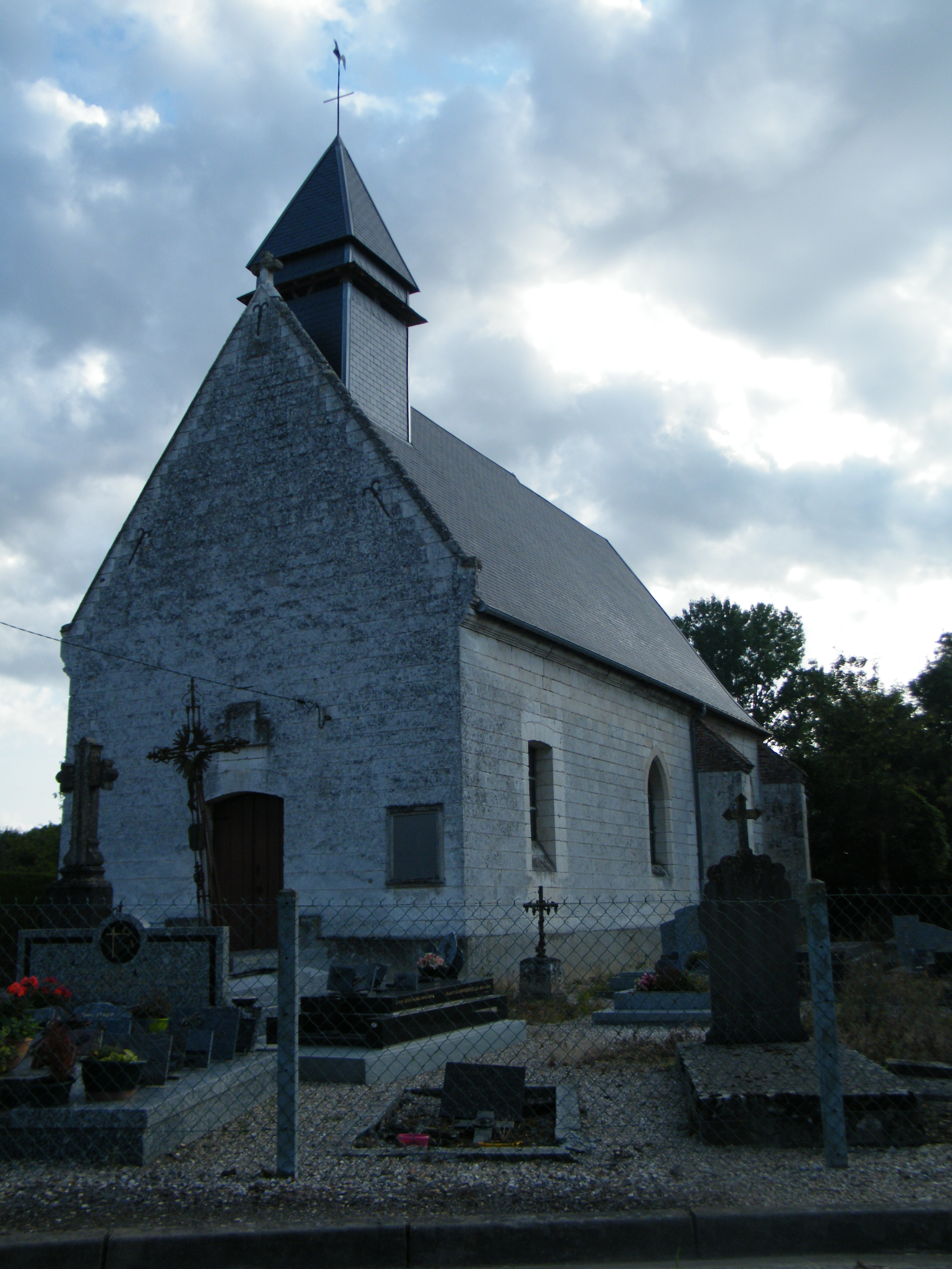 église.